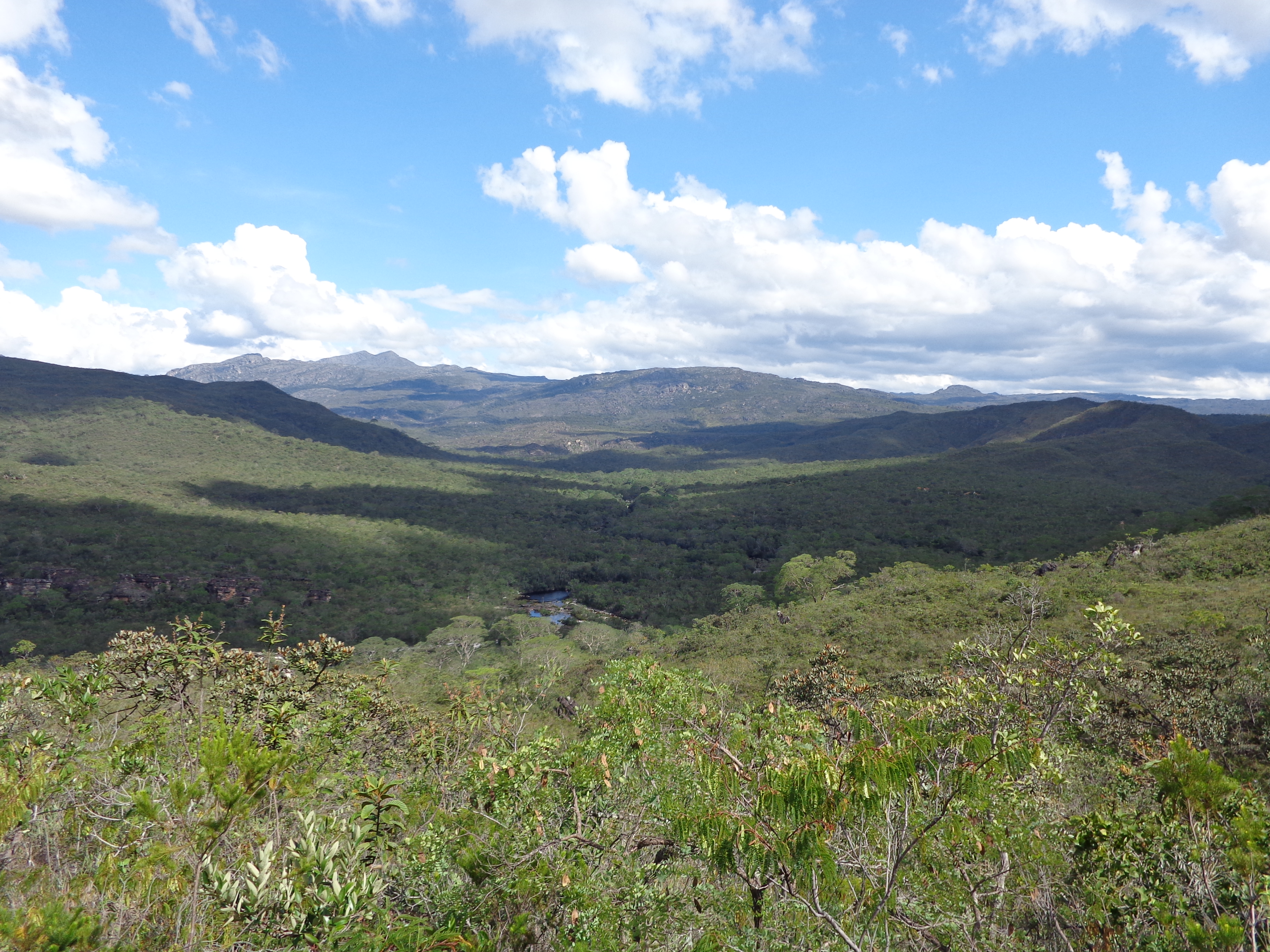 Alto da serra indo em direção à Sede do Parque